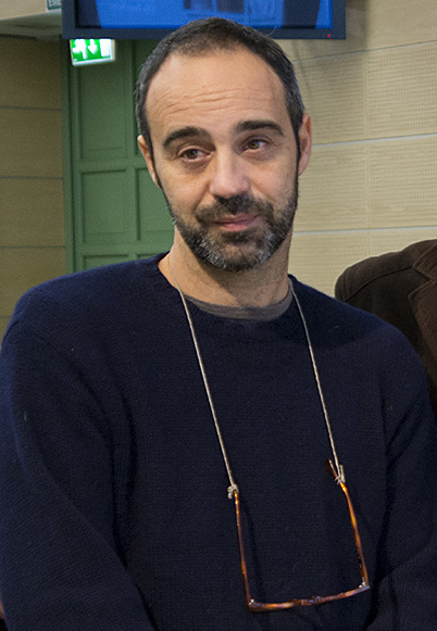 Finale Premio Chiara 2012. Da sinistra: Niccolò Ammaniti, Sandro Veronesi, Pino Cacucci e Bambi Lazzati.